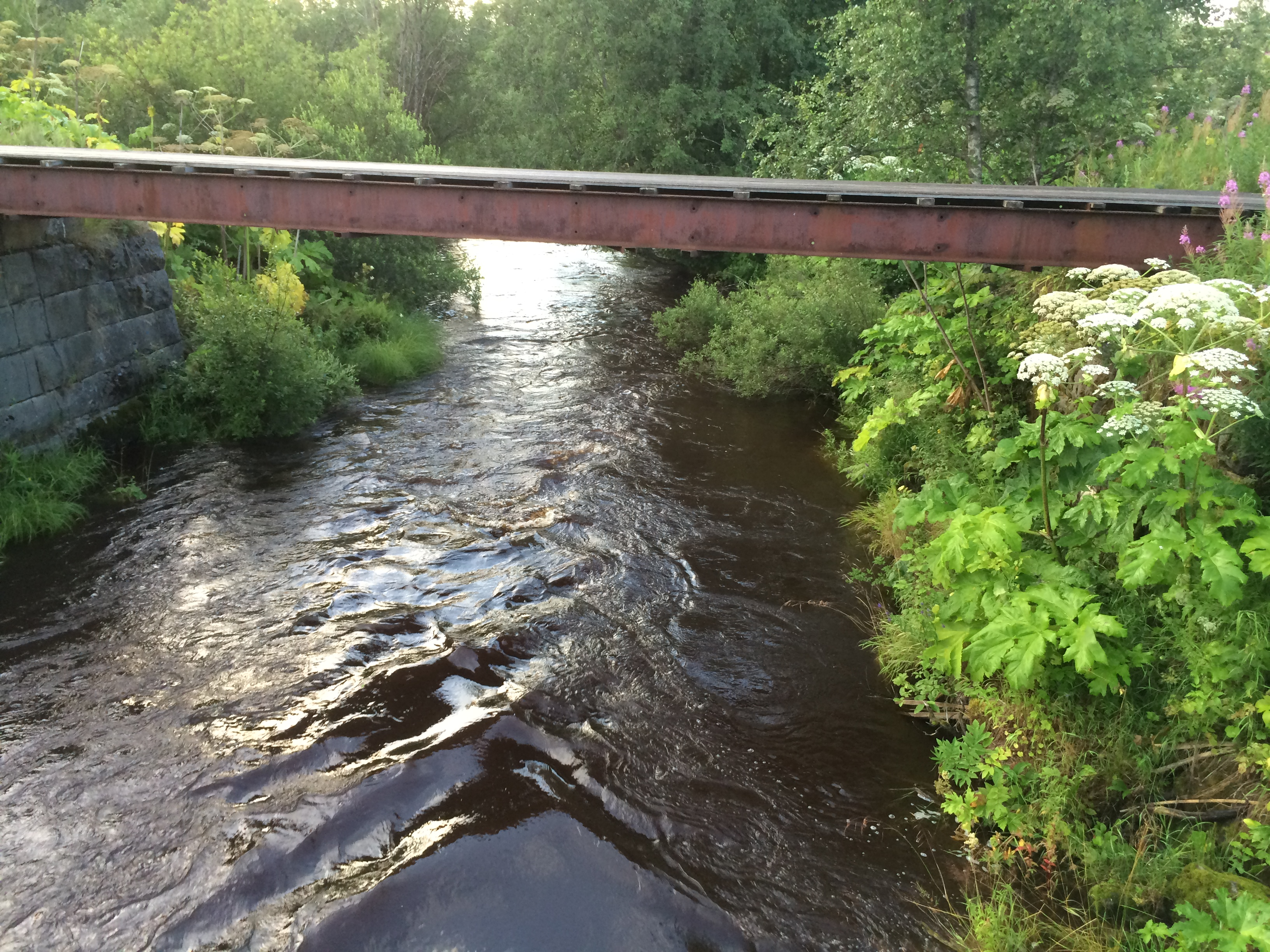 Савайнйоки